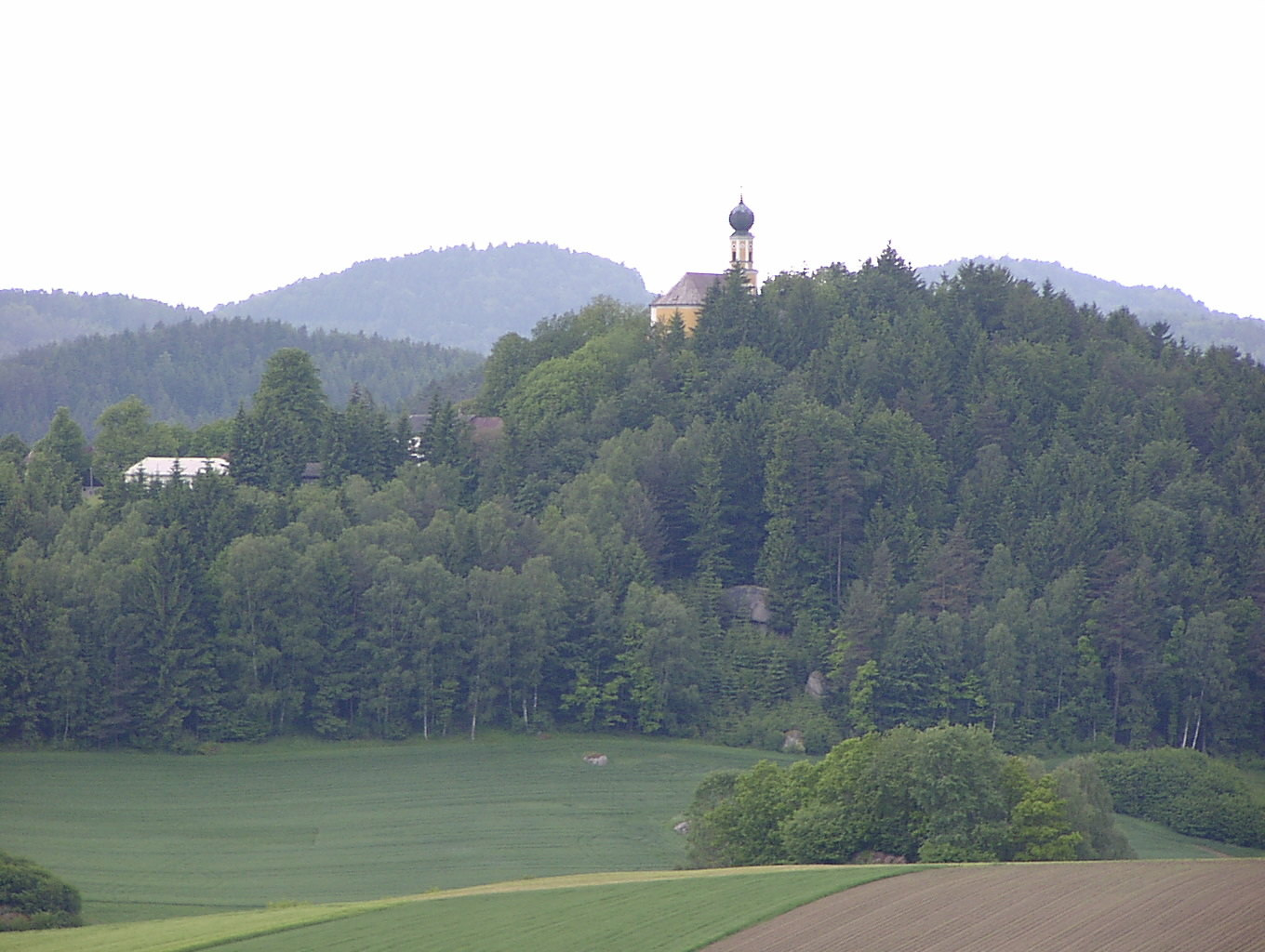 Blick auf Marienstein in der Nähe von Falkenstein